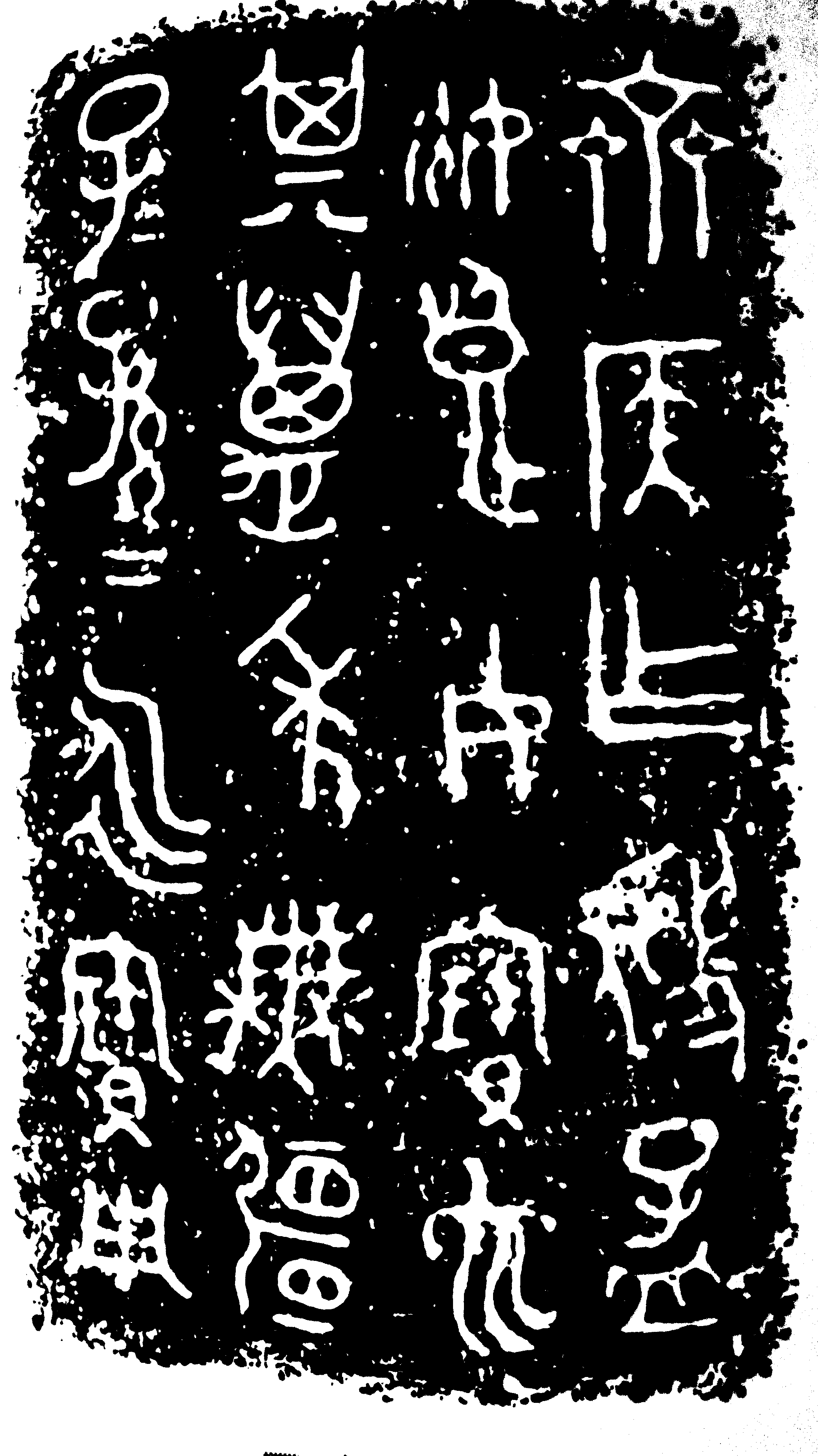 齐候匜铭文“齐候乍（作）虢孟姬良女宝匜，其万年无疆，子子孙孙永宝用”